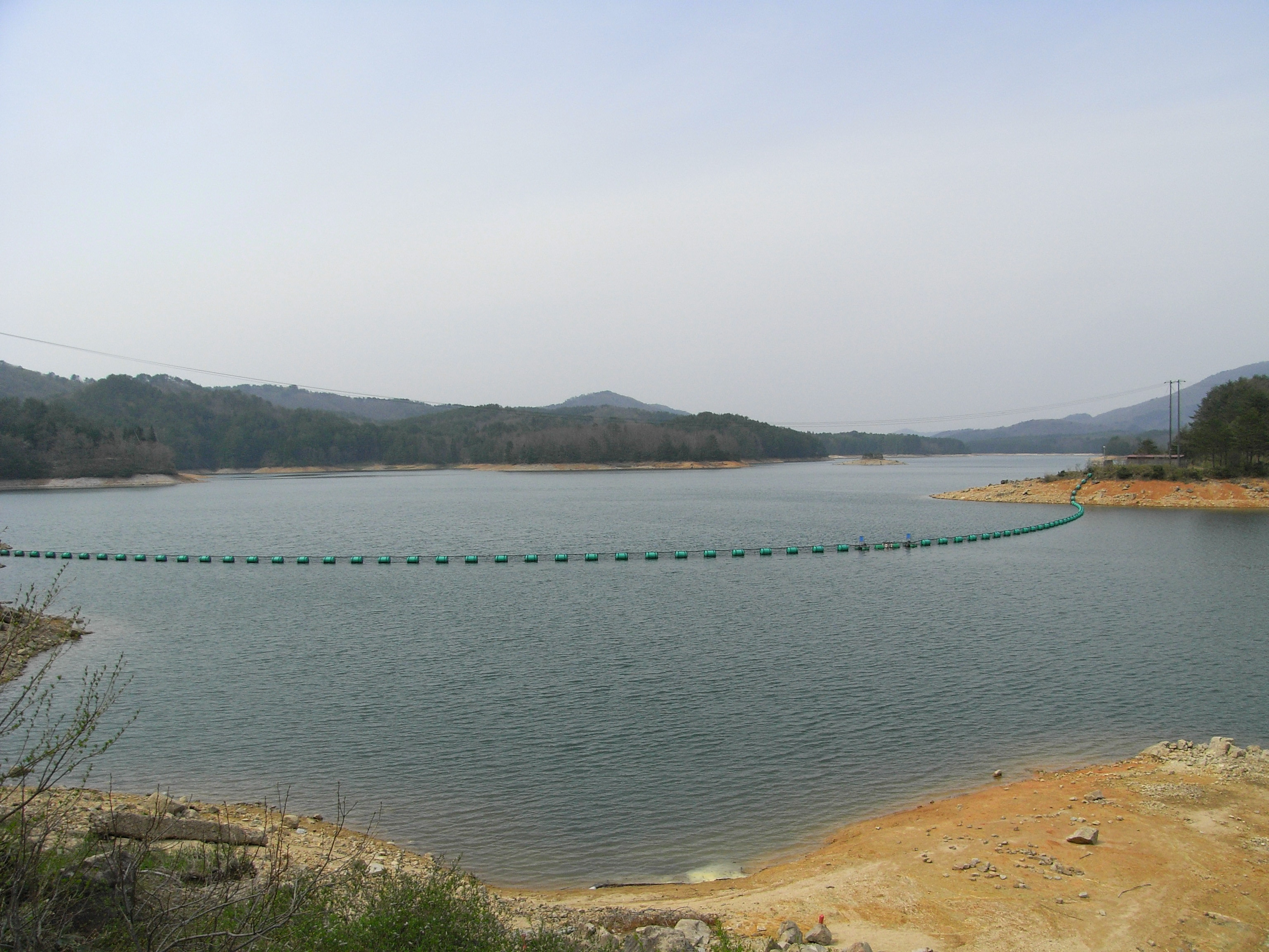 Lake